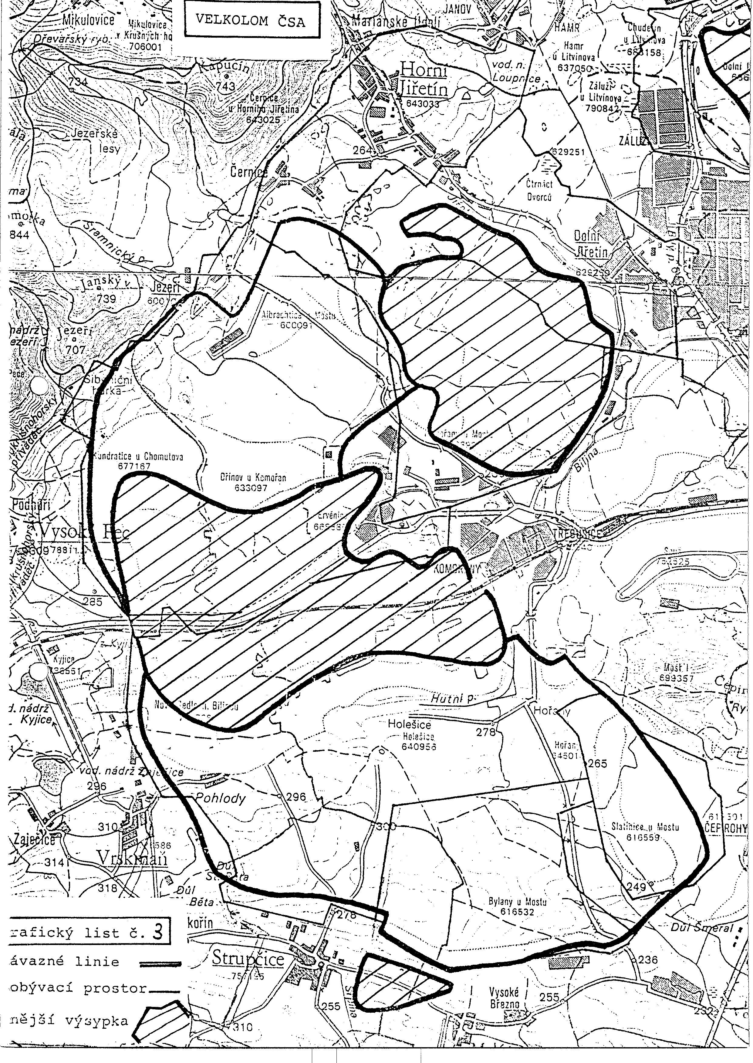 Hranice dobyvaciho prostoru severoceskych hnedouhelnych lomu CSA.